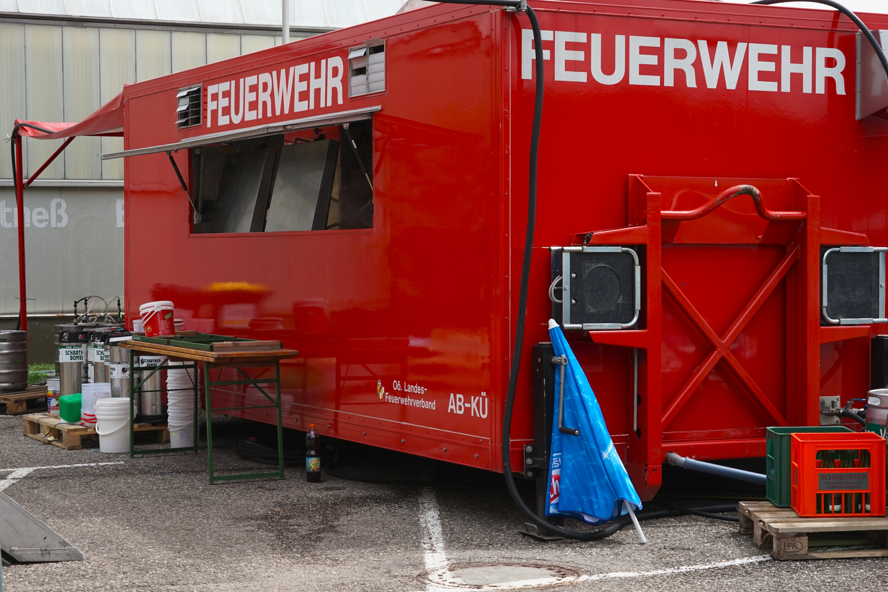 Küchenaufbau für Wechsellader - 6-Bezirke Feuerwehrjugendlager in St. Georgen im Attergau